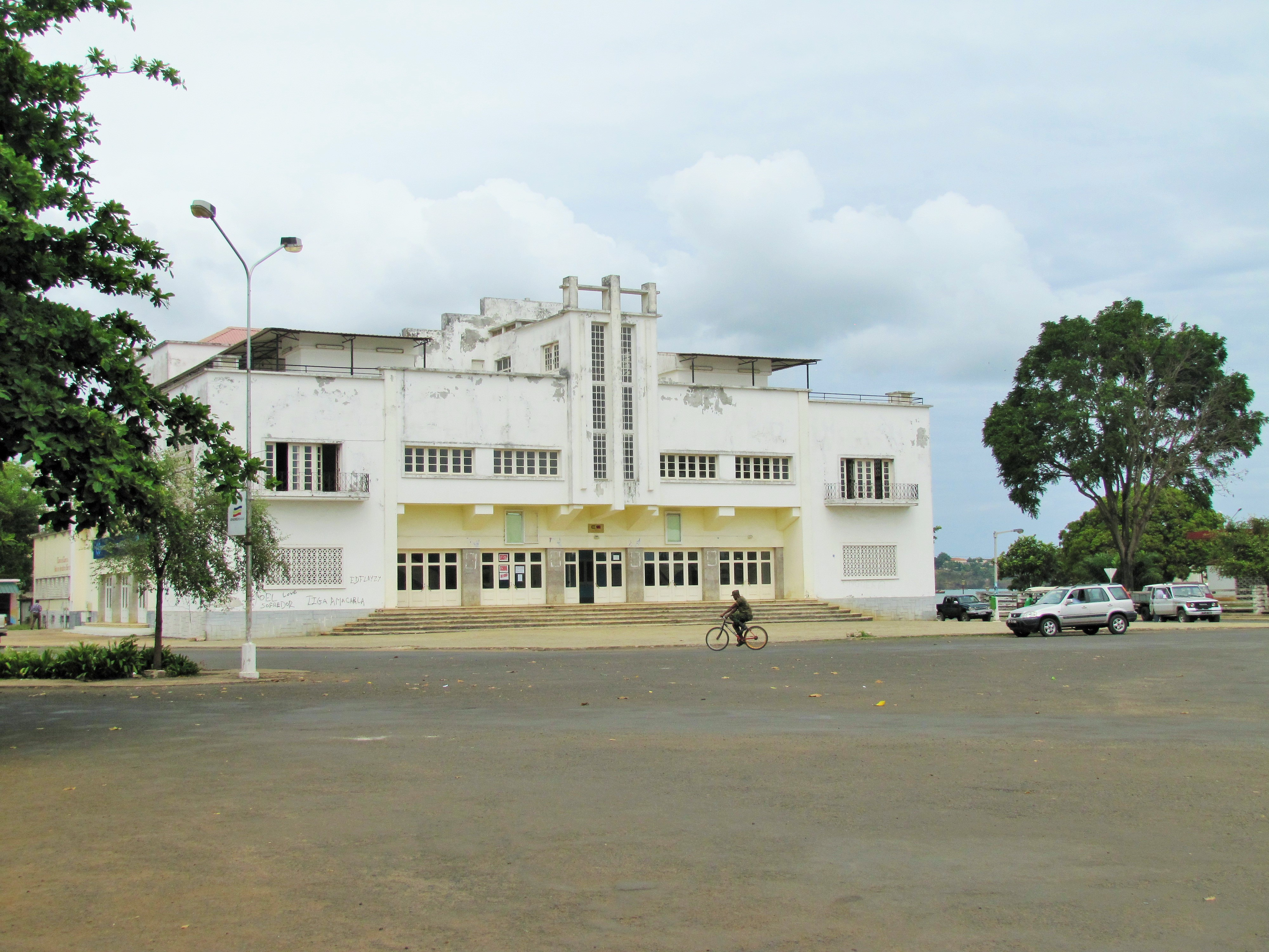 Sao Tome Cinema